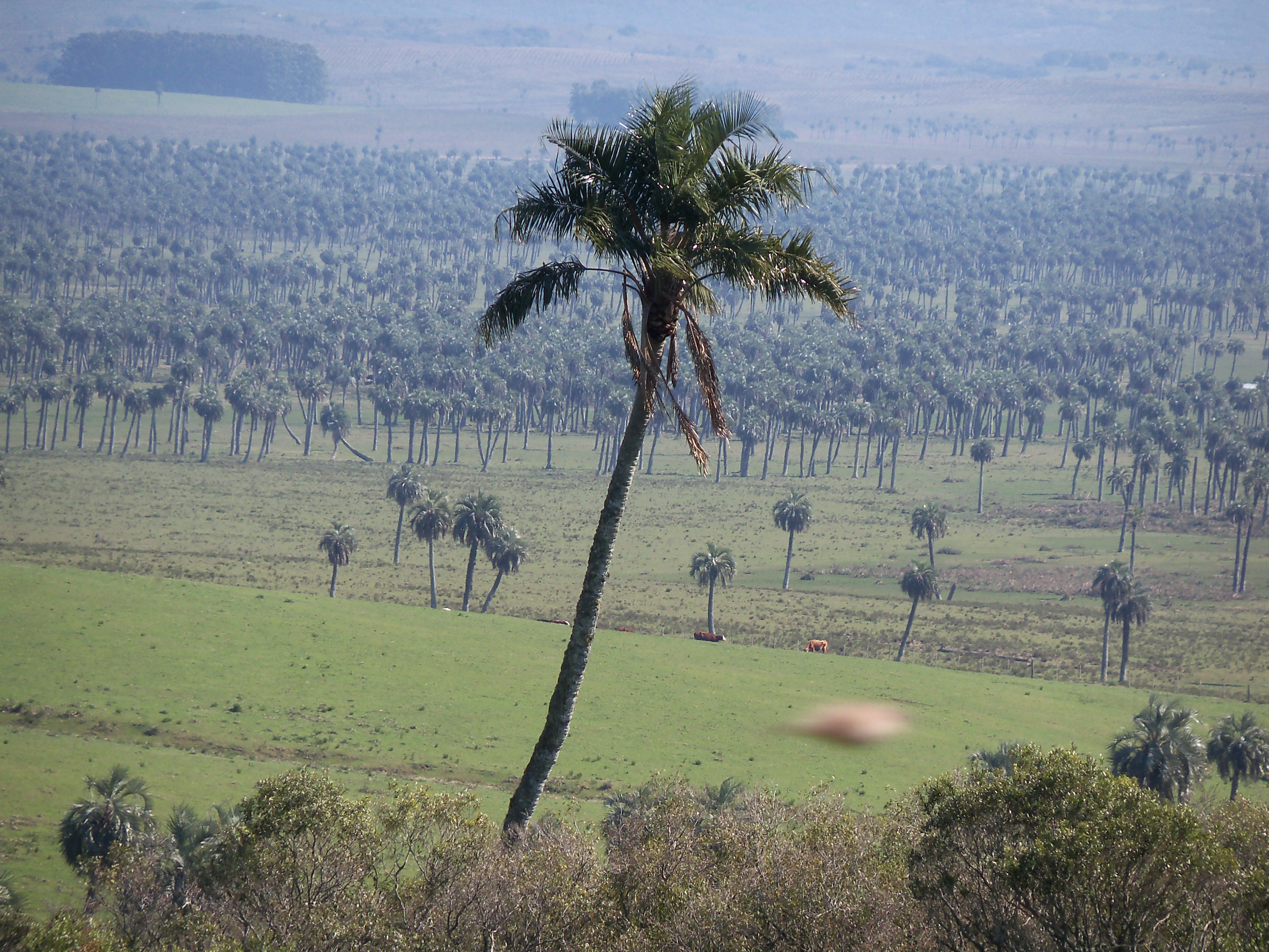 Híbrido natural entre butiá capitata y arecastrum romasofianum 1